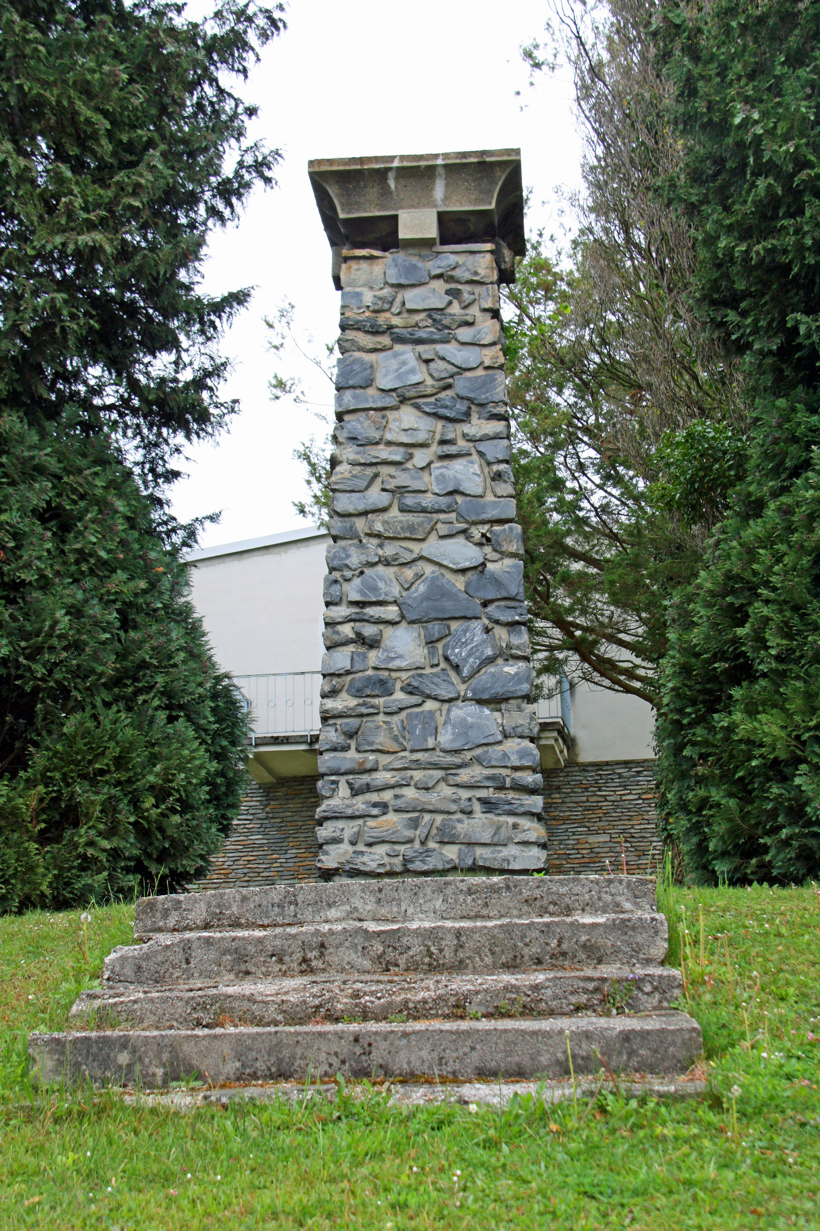 Das "kleine Anschlussdenkmal" in Oberschützen 2019